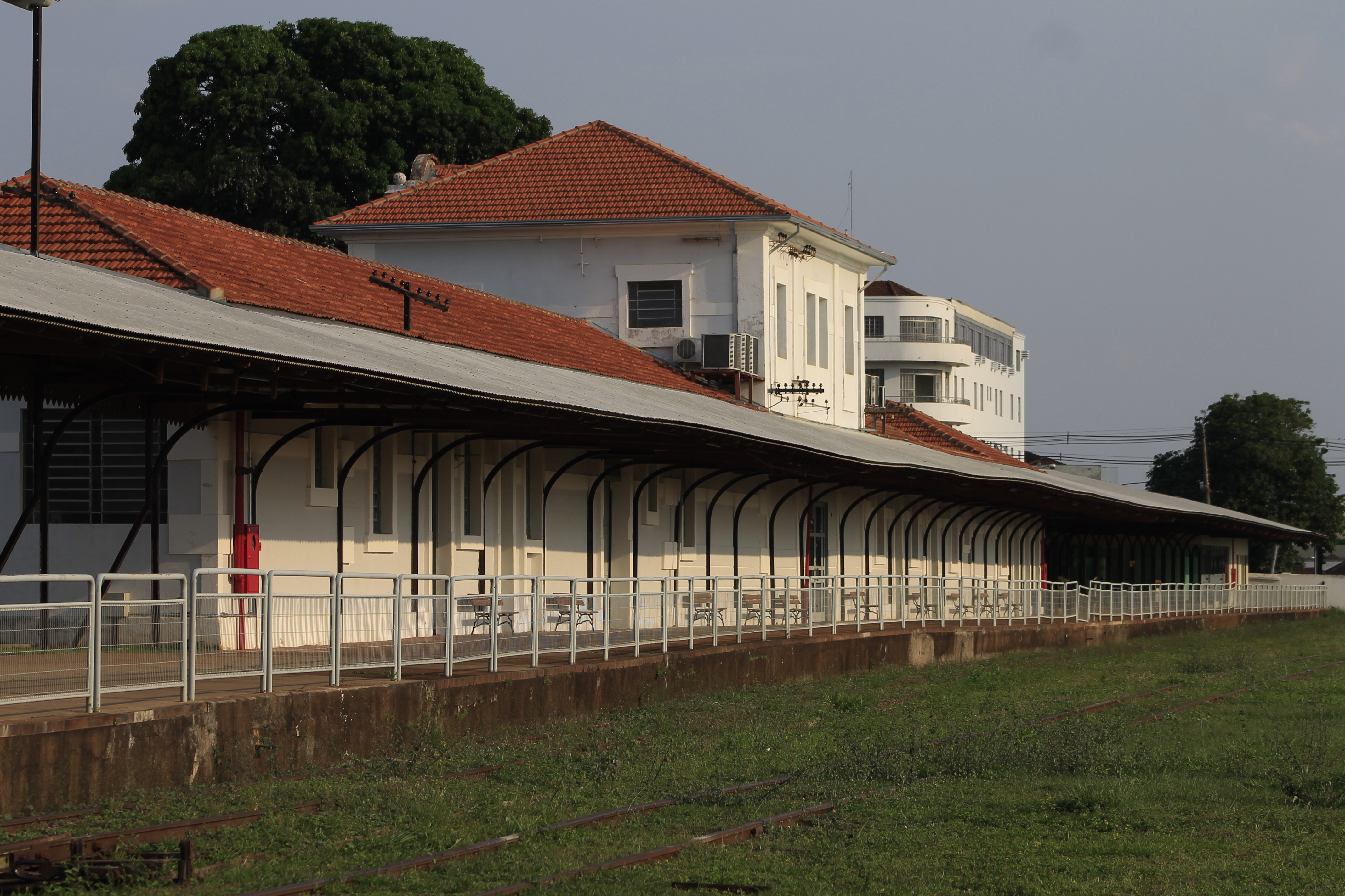 Complexo ferroviário da antiga Estrada de Ferro Noroeste do Brasil – EFNOB, em Campo Grande